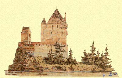 Et forsøk på rekonstruksjon av Valdisholm Borg i Østfold, av Peter Blix.